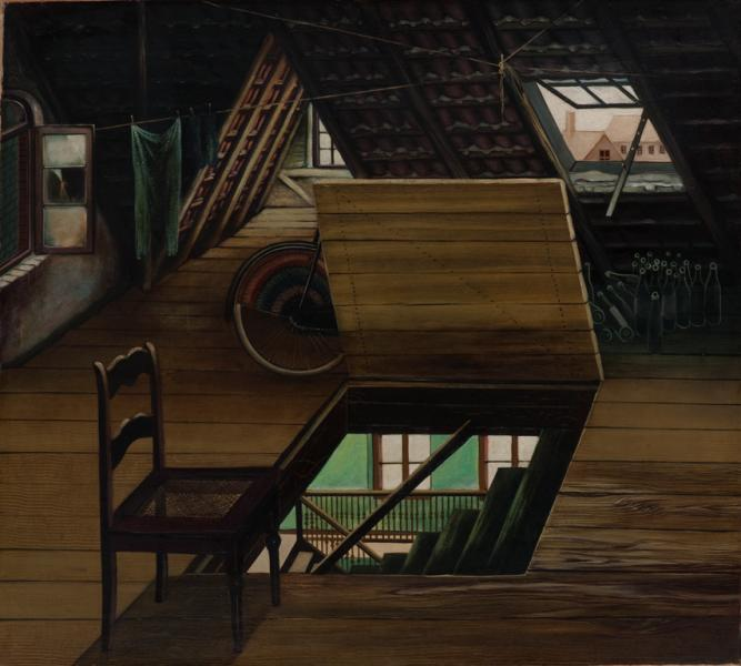 Titel: Dachboden. Öl auf Leinwand. Maße: 880 x 995 mm